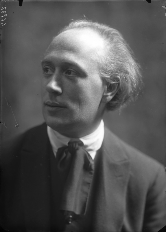 Attilio Brugnoli fotografato da Mario Nunes Vais